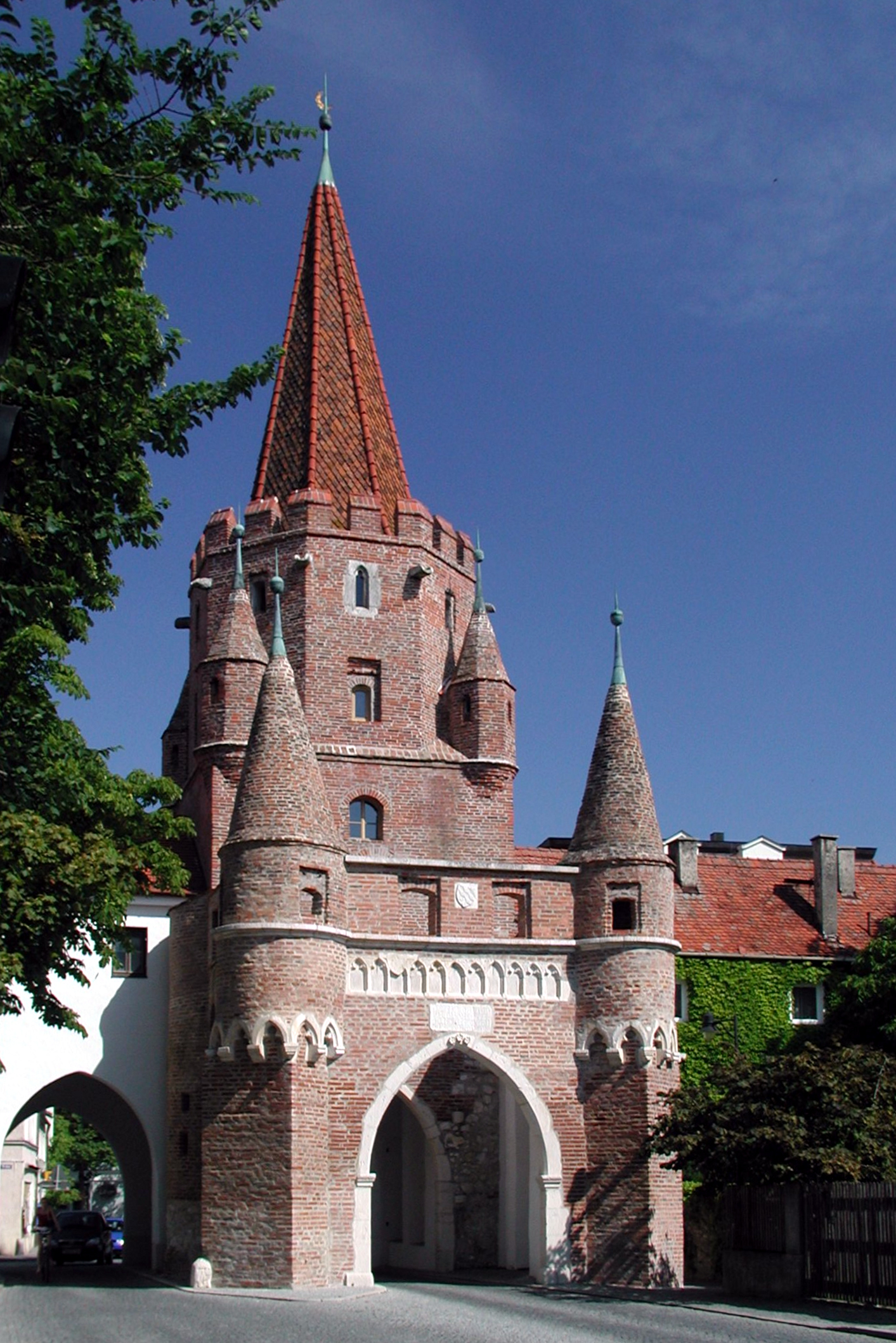 Kreuztor in Ingolstadt. Photographiert: 2004-07-30 15:00 Uhr. Leicht nachbearbeitet mit Gimp: Bildneigung, Ausschnitt, Rand eines Verkehrsschildes entfernt.